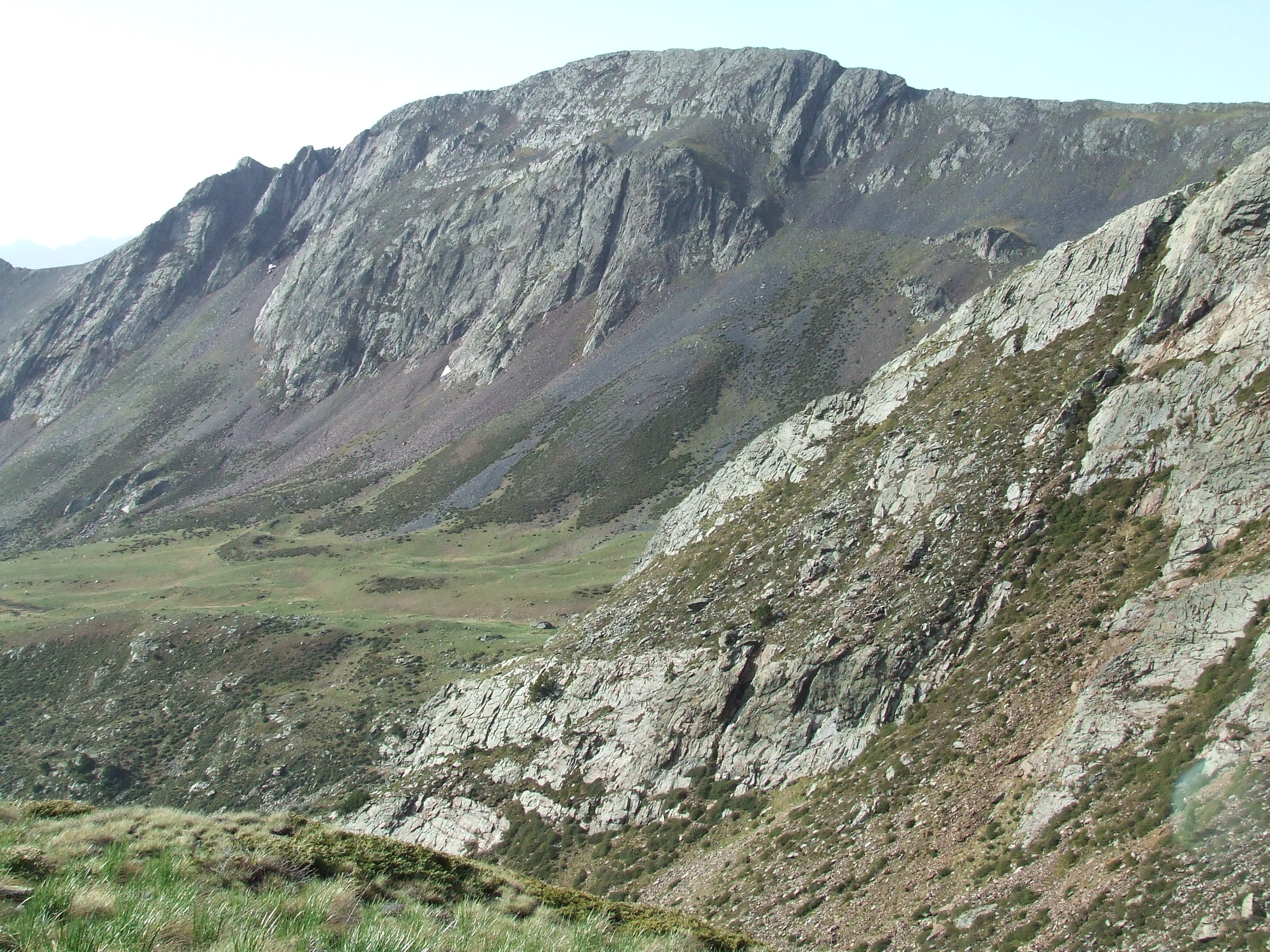 Pic del Port Vell takne from Andorran side